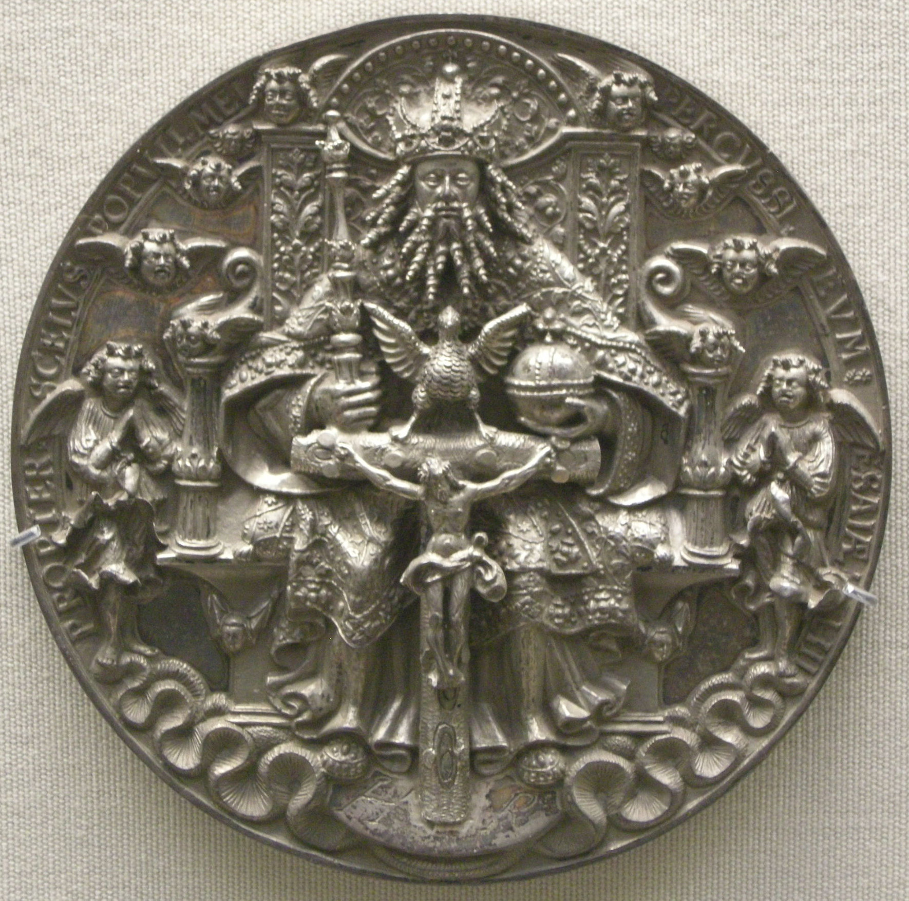 Hans reinhardt, medaglia argentea della trinità, 1544